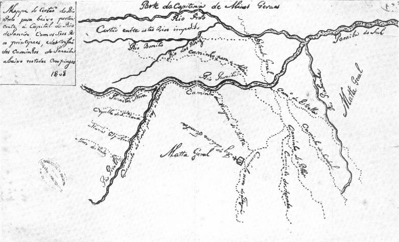 Supôe-se que êsse caminho seja o mesmo assinalado na carta geográfica de Inácio de Souza Werneck, datada de 1808 — o mais antigo mapa do Certão do Rio Preto, que se encontra na Biblioteca Nacional. Nesse mapa, como se vê na gravura, notam-se vários caminhos, assinalados por pontos, destacando-se o Caminho da Aldêa (Valença), entre os rios das Flores e Paraiba, ao lado da Estrada Geral. ópia do autógrafo do Capitão de Ordenanças Inácio de Souza Werneck, do ano de 1808, existente na secção de manuscritos da Biblioteca Nacional do Rio de Janeiro (Anexo aos apontamentos sobre sua biografia , organizada pelo seu descendente, dr. André Werneck). Neste mapa, o município de Valença está compreendido entre os rios Paraíba e Preto, e onde se lê “Caminho para a Aldeia” está situada a cidade de Valença, antiga aldeia dos Índios Coroados. Observa-se, o curso dos rios das Flores e Bonito, em cujas raias estava a aldeia dos índios Araris, a repartição dos conservadores, ou – Conservatória dos Índios – aquém do sertão do Rio Preto nos limites da Capitania de Minas Gerais.